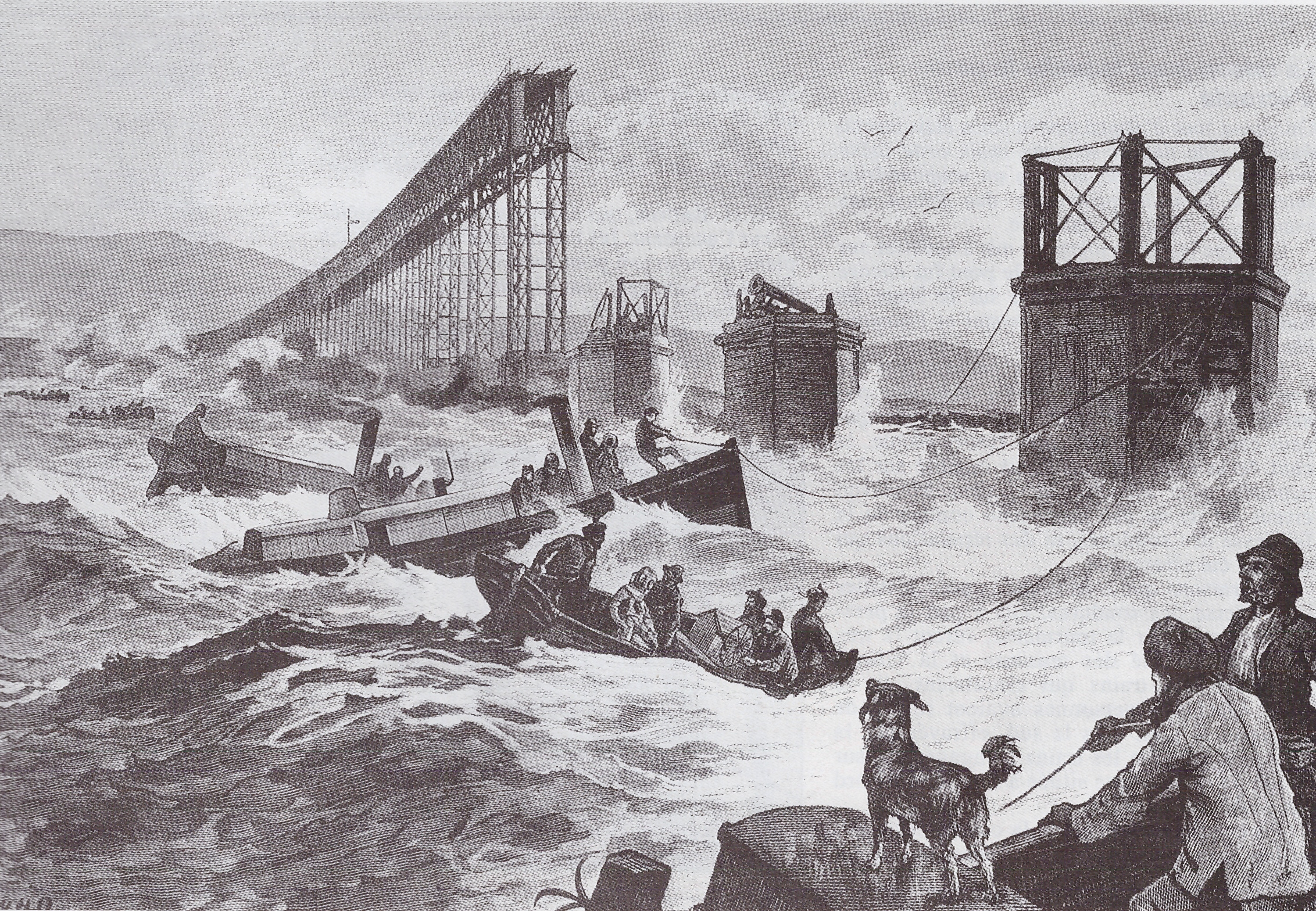 Illustration des secours après la catastrophe ferroviaire du pont sur le Tay survenue le 28 décembre 1879